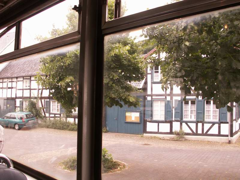 Haltestelle Olef der Oleftalbahn photographed by me